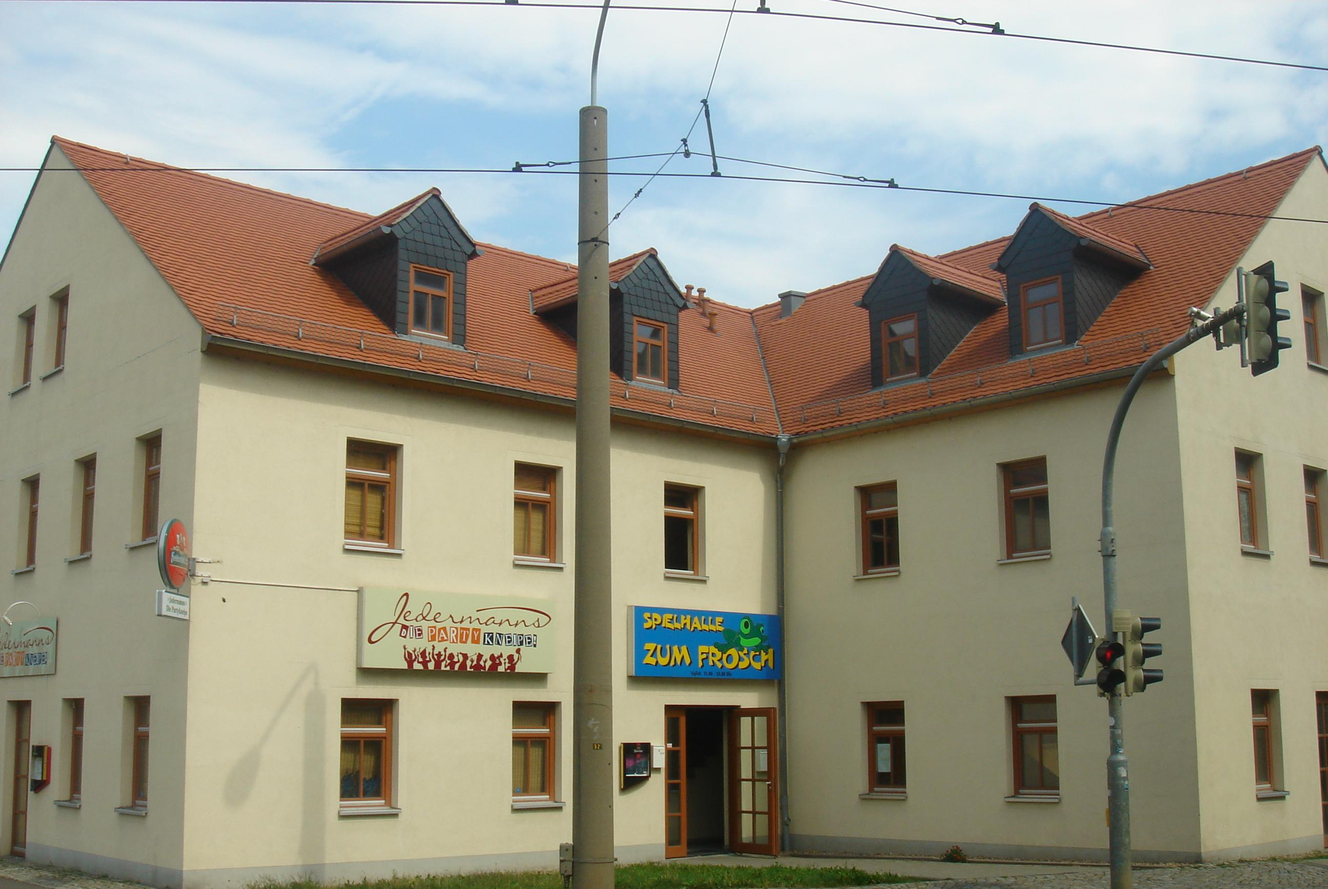 Einkaufszentrum am Frosch in Altcotta, Lübecker Straße Ecke Raimundstraße